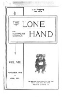 The Lone Hand , 1 February vol. 8 no. 46 1911 (list.49)